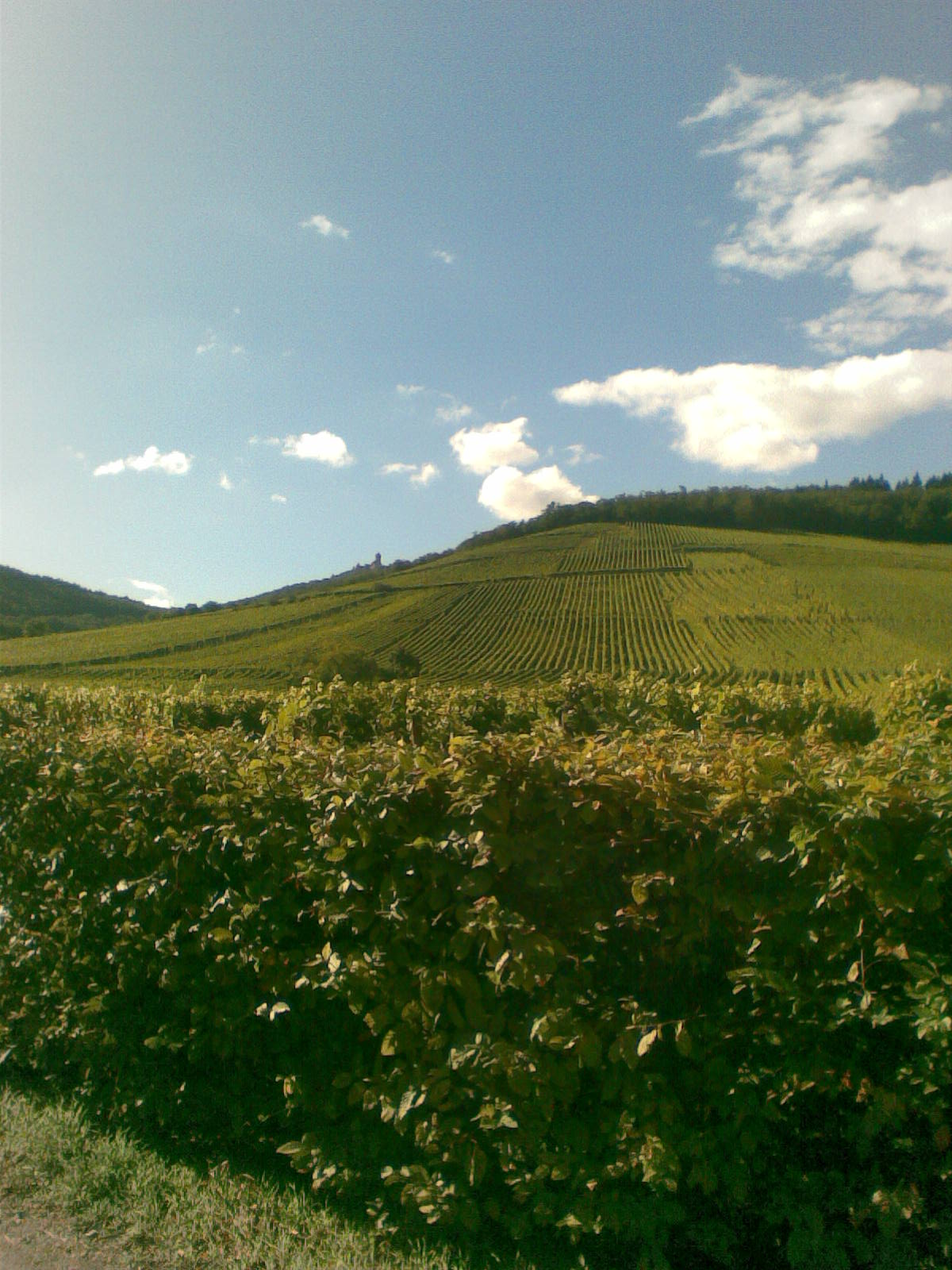 Vigne en alsace